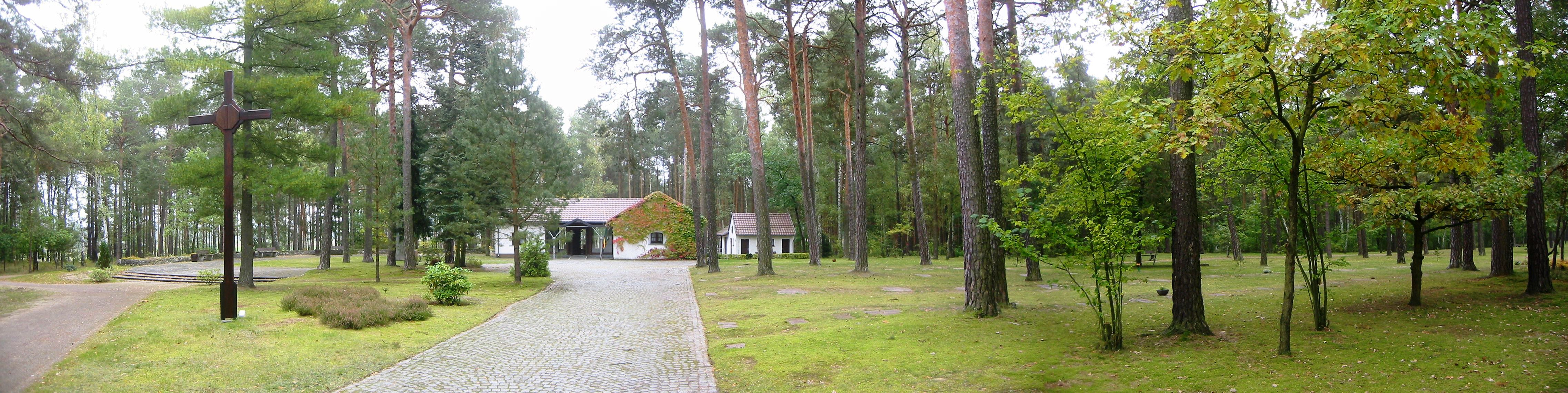 Waldfriedhof Halbe in der Gemeinde Halbe im Landkreis Dahme-Spreewald bei Berlin. Der Friedhof ist mit über 28.000 Opfern eine der größten Kriegsgräberstätten Deutschlands.